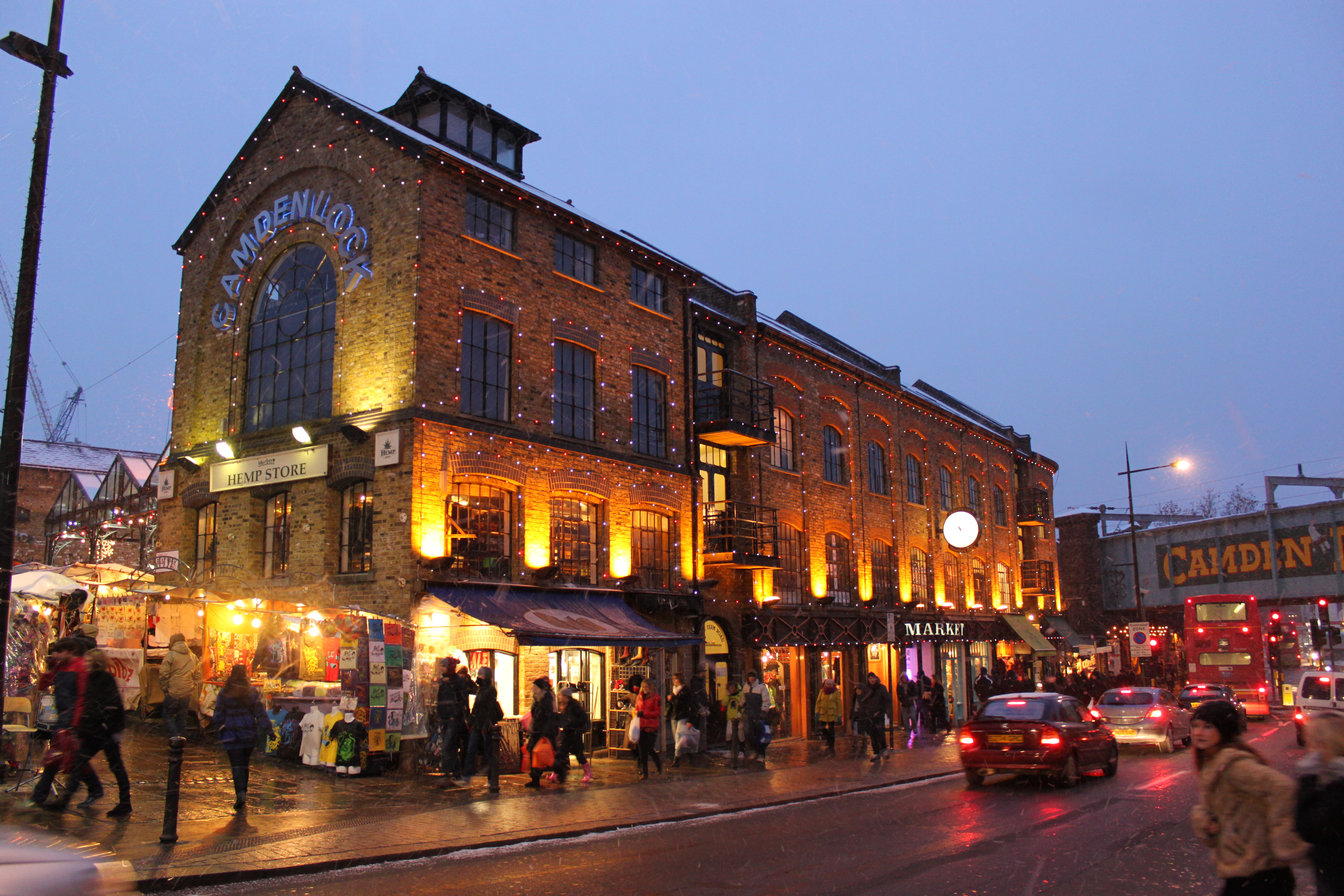 Camden Lock Market Hall